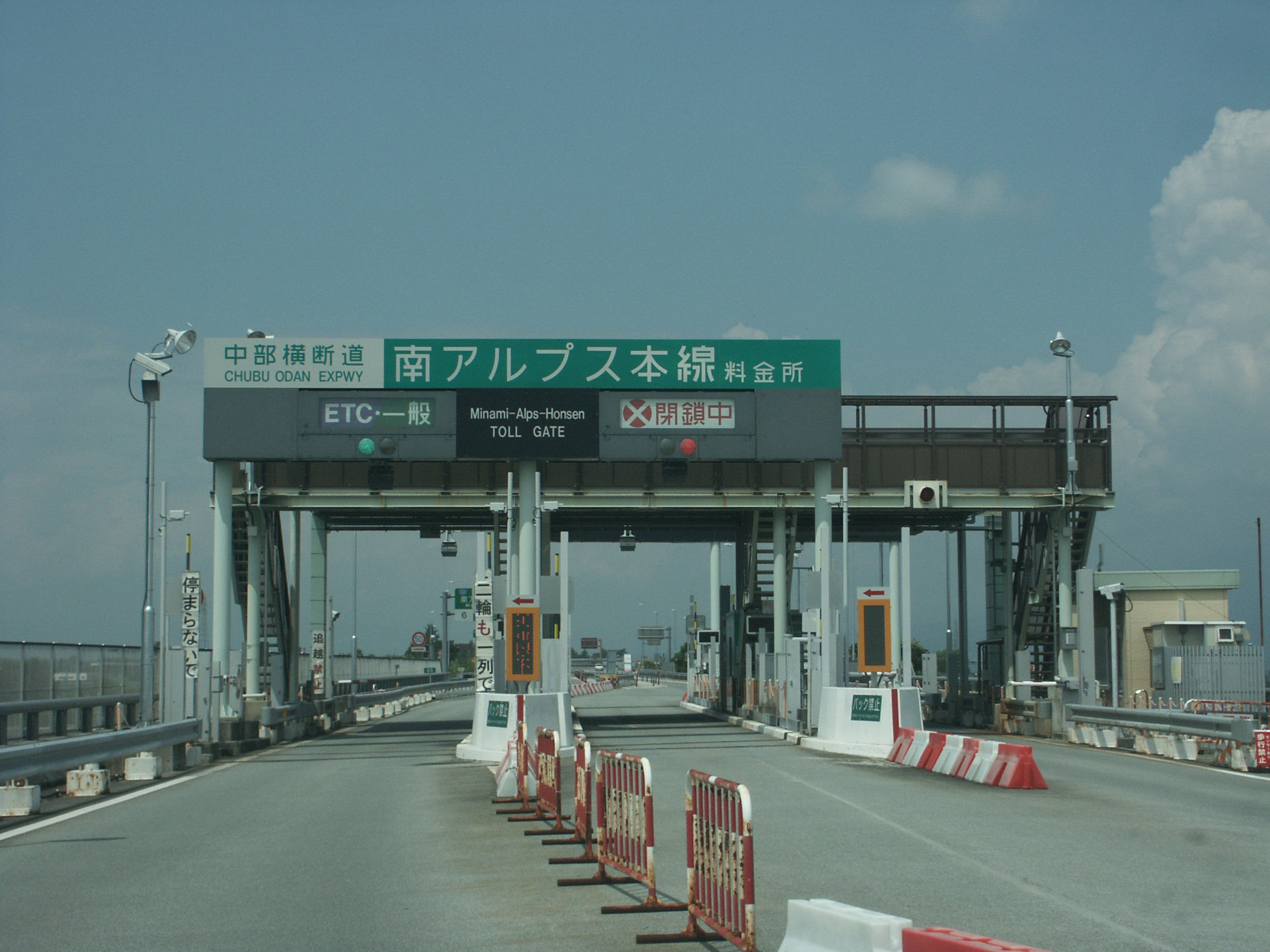 中部横断自動車道南アルプス本線料金所